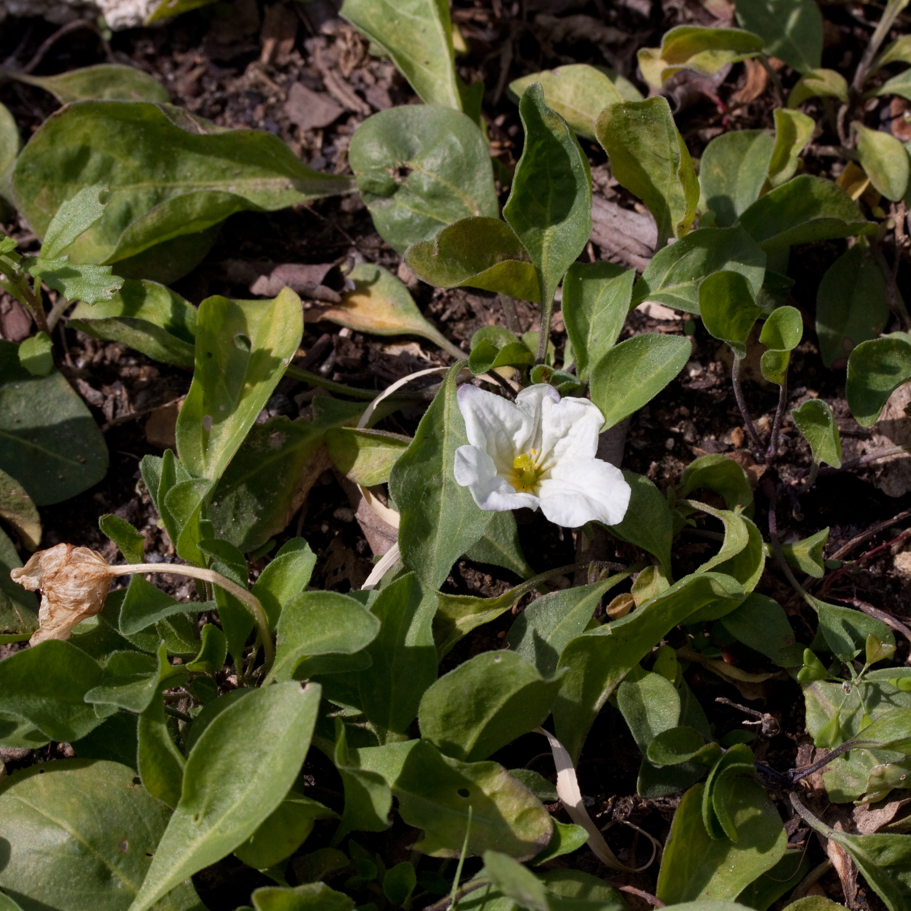 Fleur de Nierembergia repens - Jardin des Plantes - Paris - France